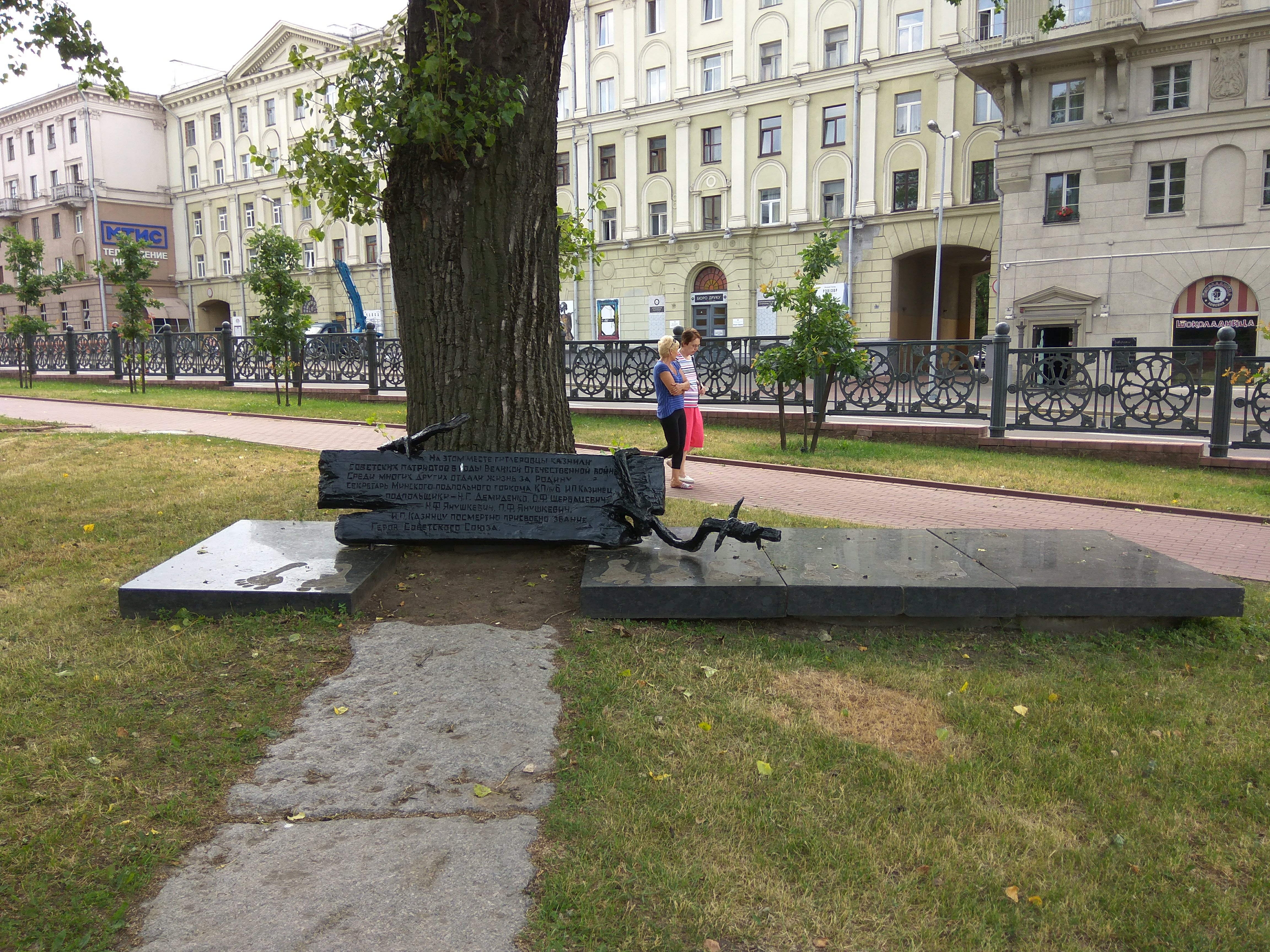 Мінск. Аляксандраўскі сквер. 2018